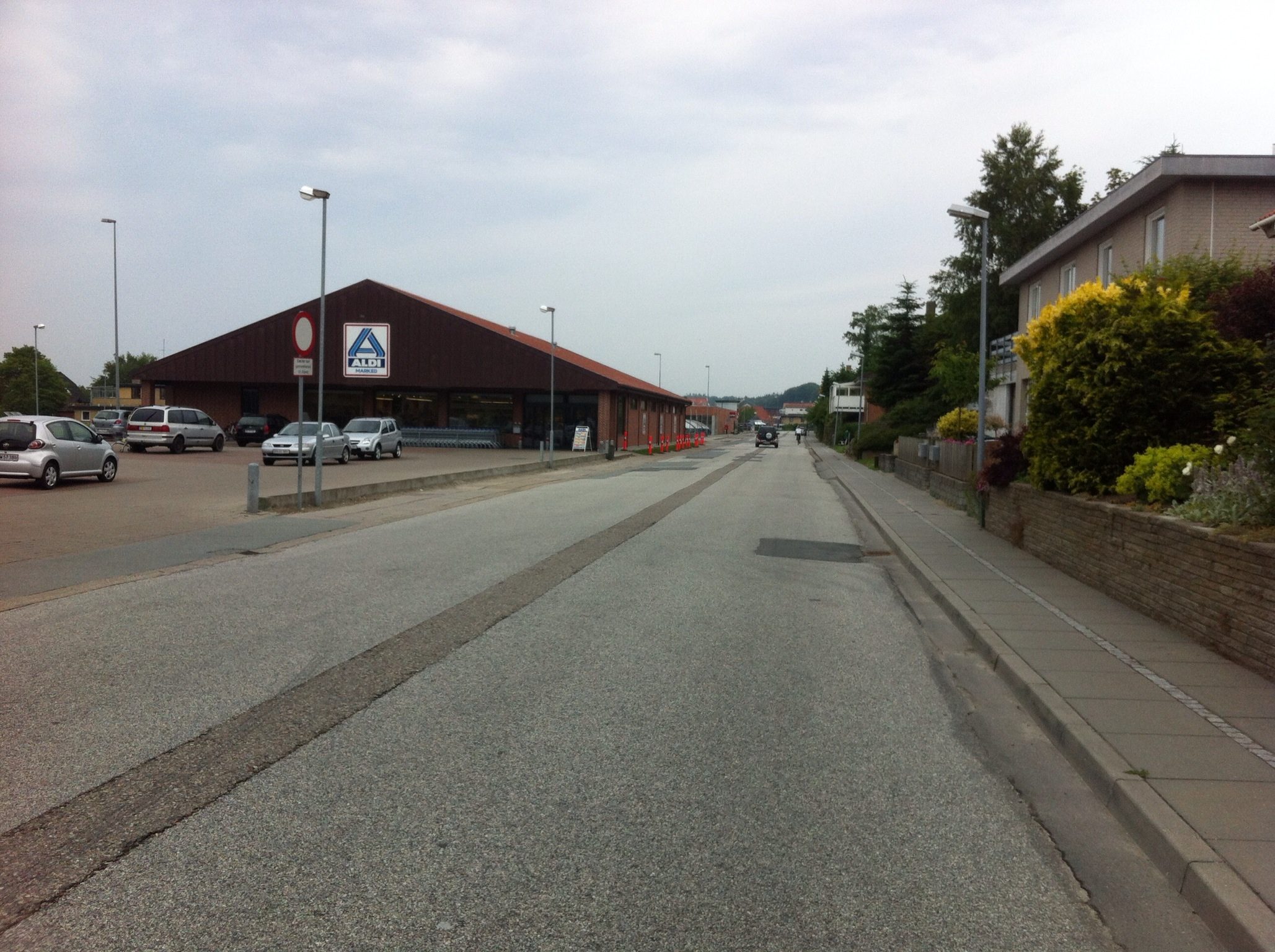 Jernbanegade, 9560 Hadsund